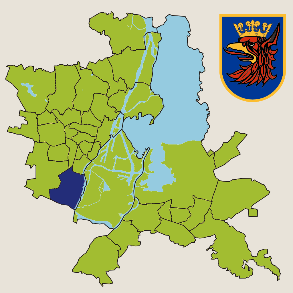 Osiedle "Pomorzany" w Szczecinie – jednostka pomocnicza miasta w 2010